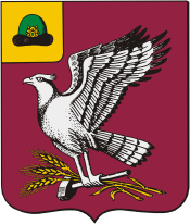 Герб Скопинского района Рязанской области